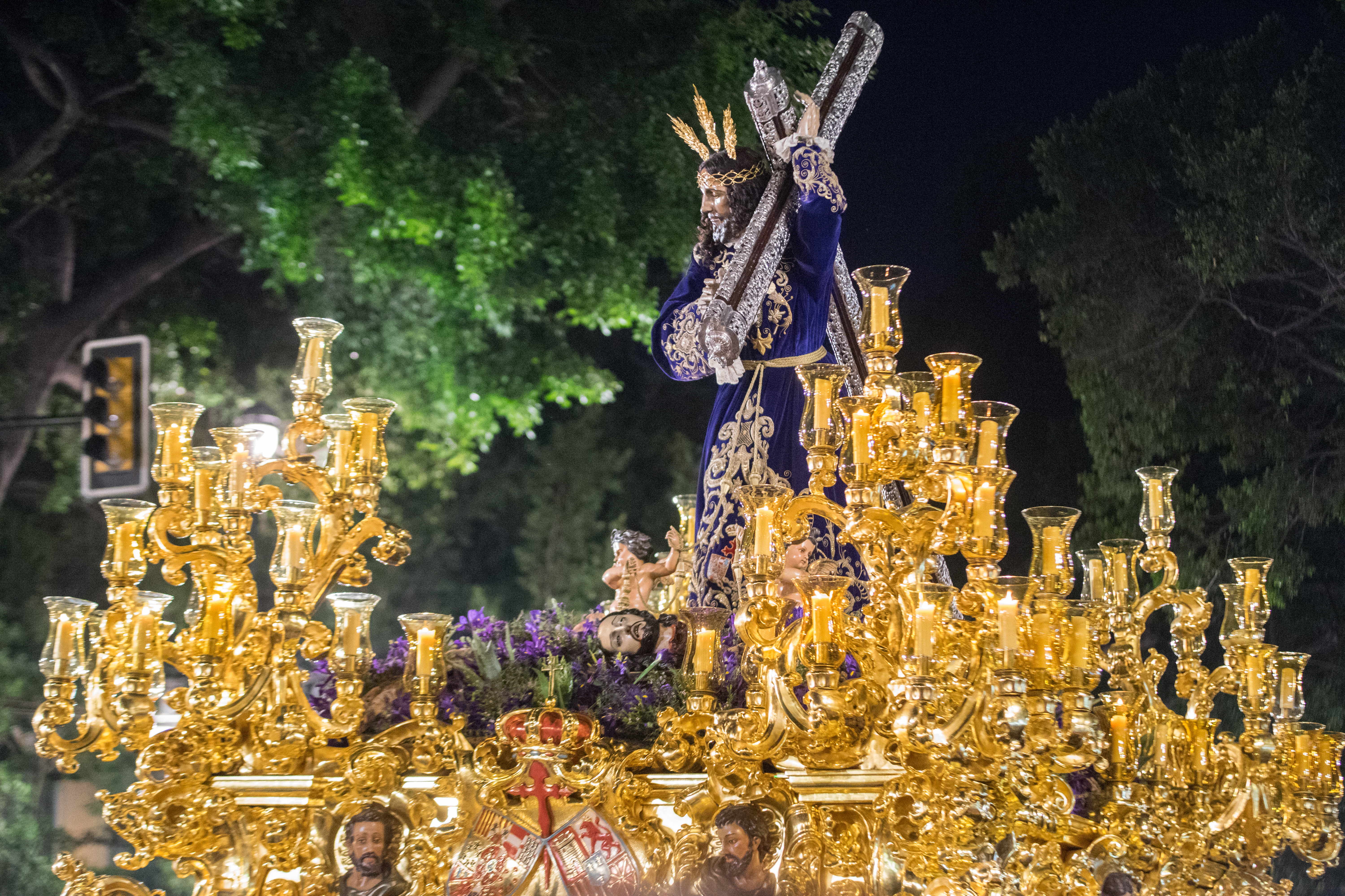 Trono del Rico de la Real, Excelentísima, Muy Ilustre y Venerable Cofradía de Culto y Procesión de Nuestro Padre Jesús Nazareno Titulado “El Rico” y María Santísima del Amor This is a photography of a Folklore festival in Spain (Wikidata id Q9075883).